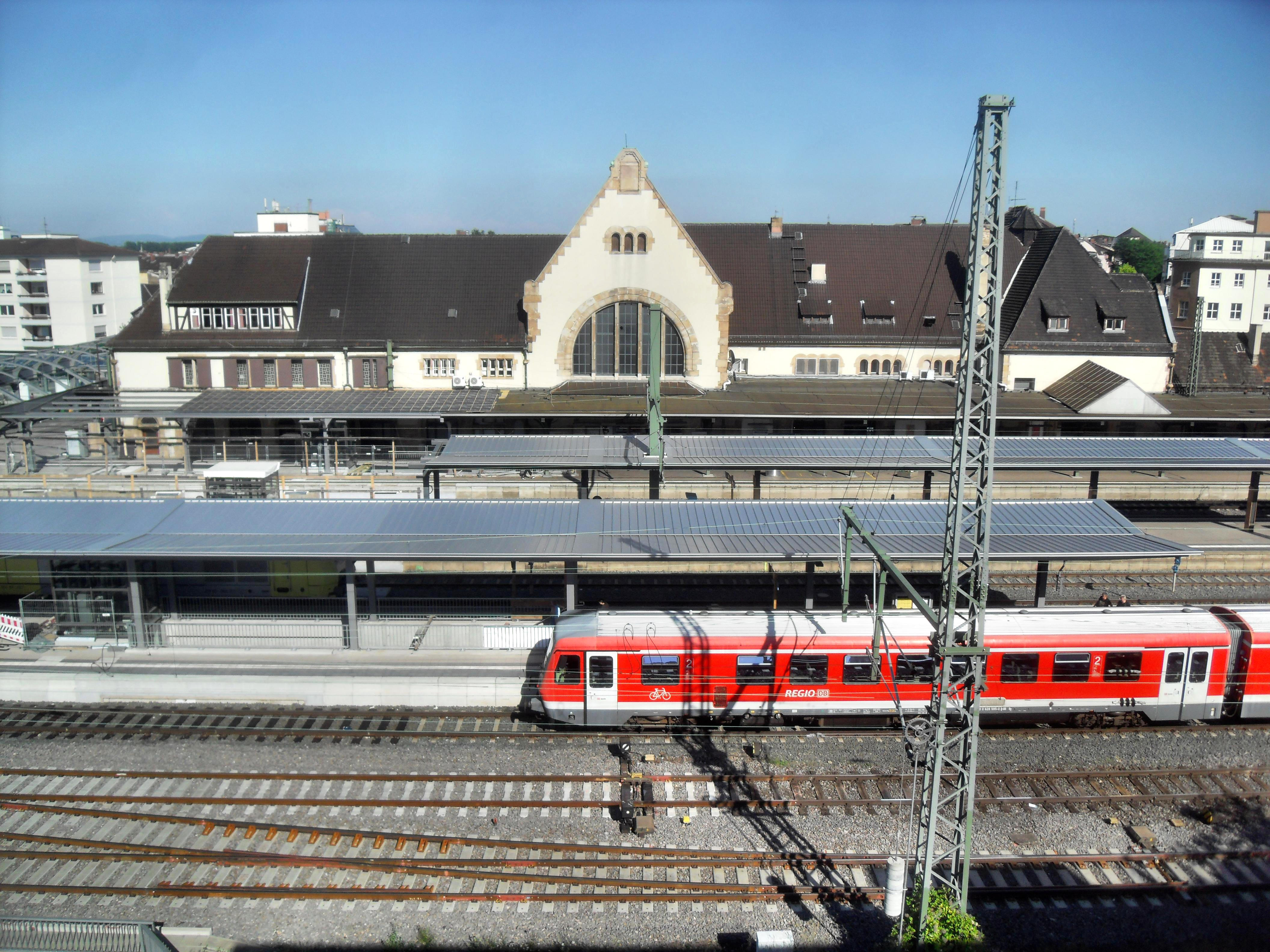 Blick über die Bahnsteige zu den Gleisen 1 bis 5 zum Empfangsgebäude des Wormser Hauptbahnhofes